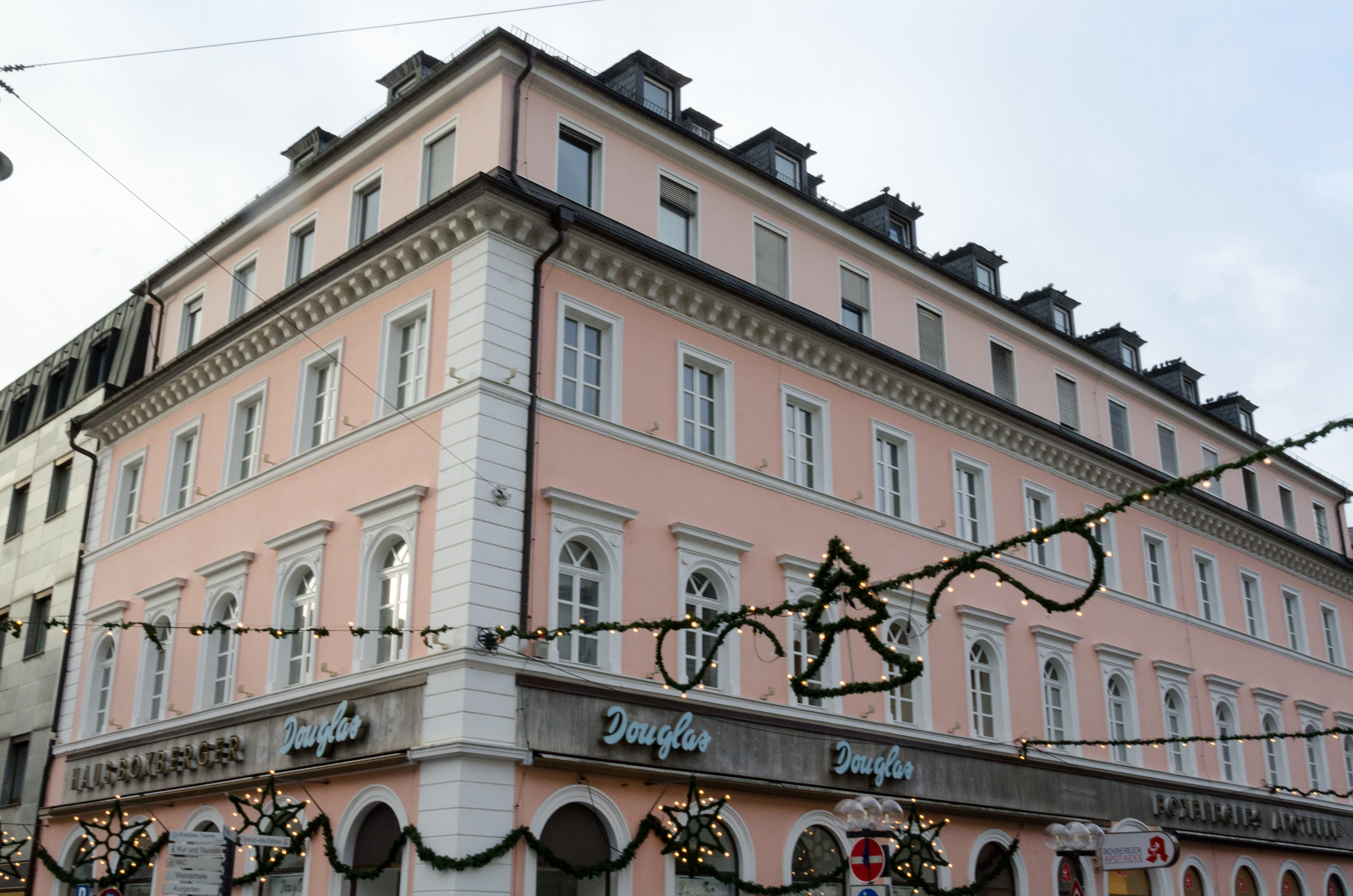 Bad Kissingen, Untere Marktstraße 12